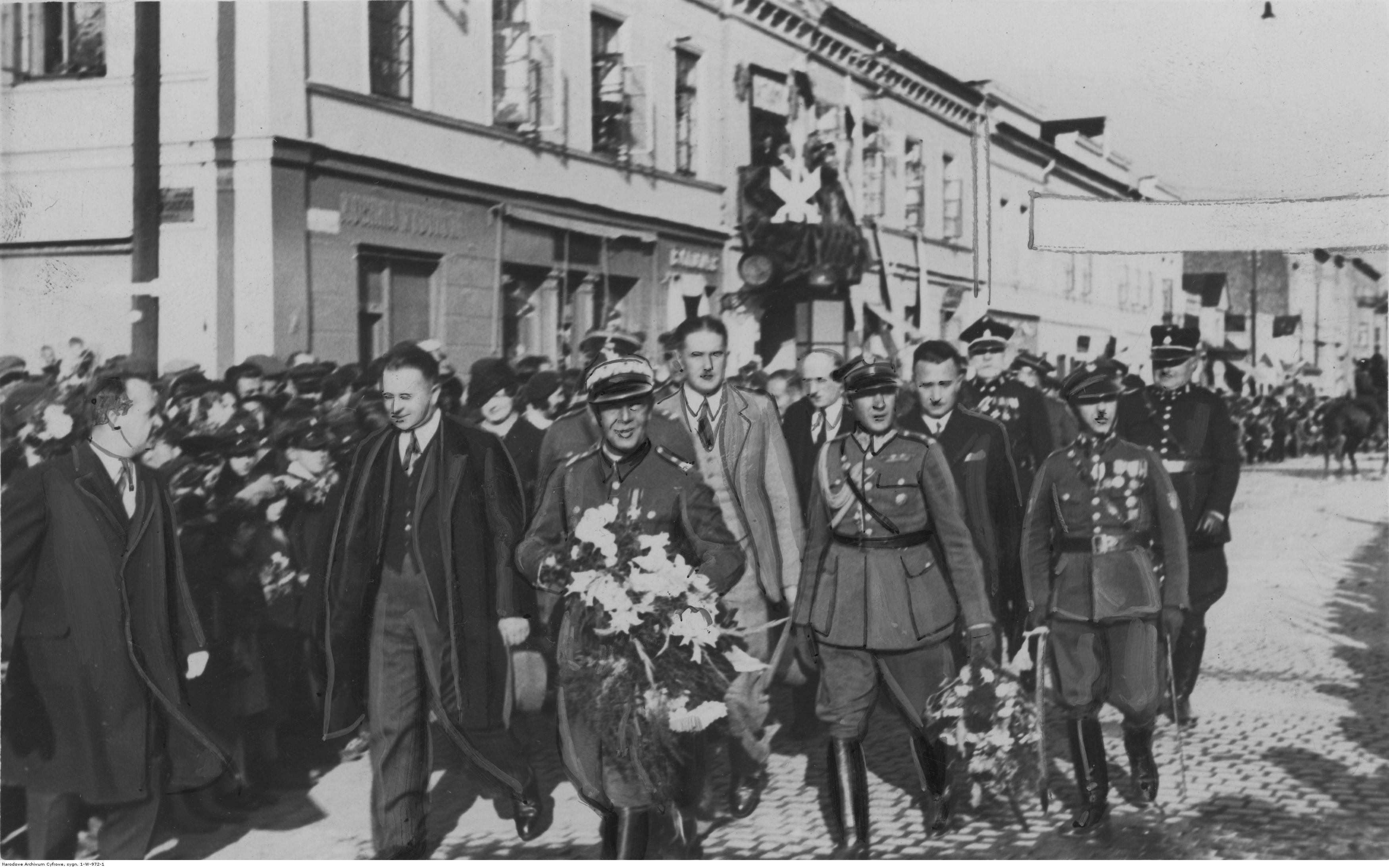 Powitanie w Częstochowie oddziałów wojskowych powracających z manewrów; wrzesień 1935. Fragment uroczystości. Na pierwszym planie z kwiatami d-ca 7 DP gen. bryg. Janusz Gąsiorowski. Widoczni także m.in.: prezydent Jan Mackiewicz, starosta Bazyli Rogowski, mjr Stabrecki. Koncern Ilustrowany Kurier Codzienny - Archiwum Ilustracji. Sygnatura: 1-W-972-1